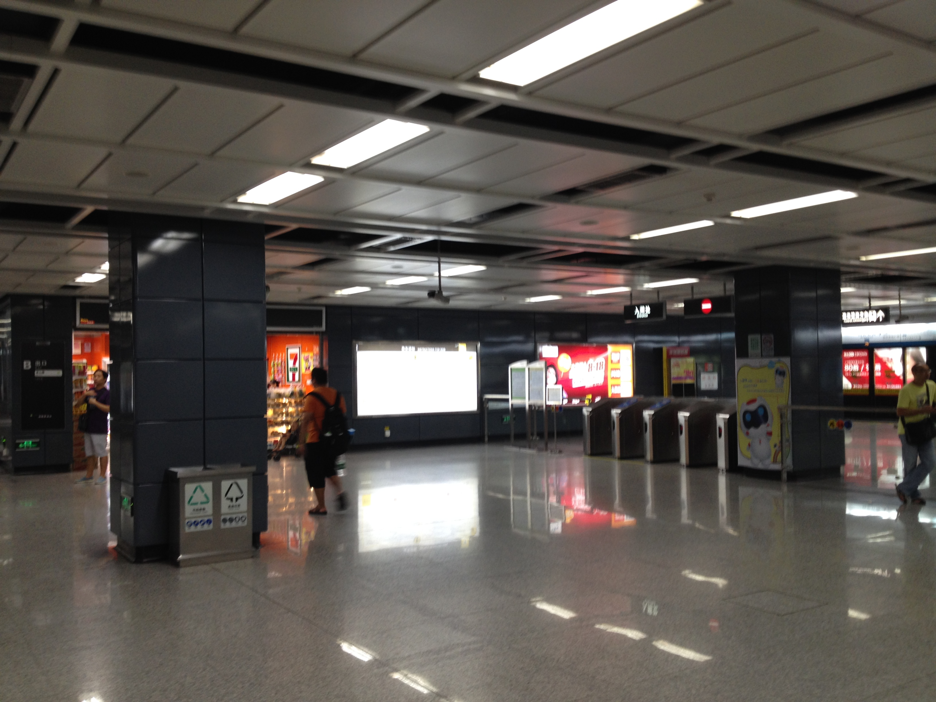 广州地铁白云公园站东站厅